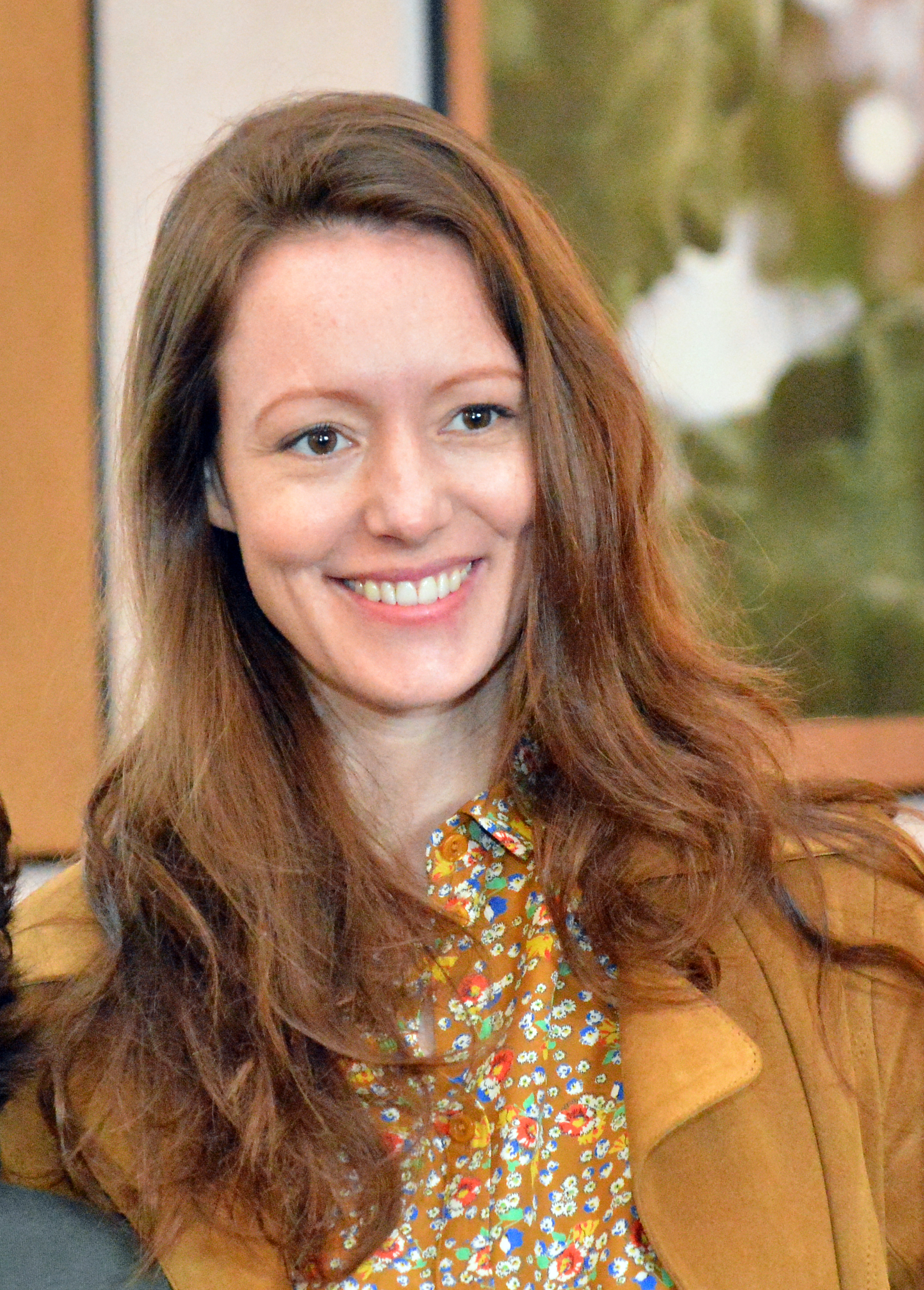 Lavinia Wilson, Schauspielerin, bei einen Fototermin der Komödie Simon sagt auf Wiedersehen zu seiner Vorhaut.